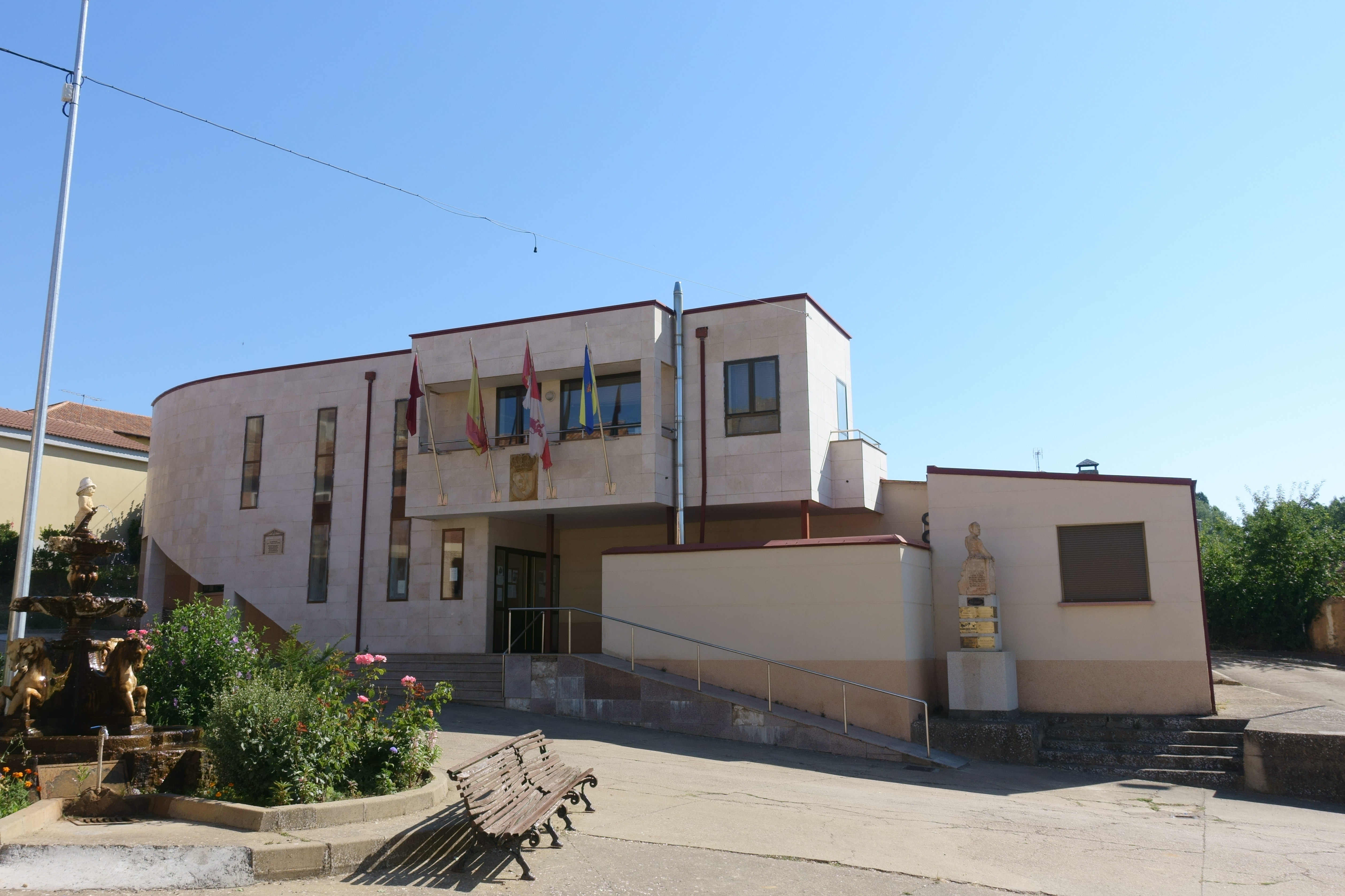 Casa consistorial de Cea (León, España).